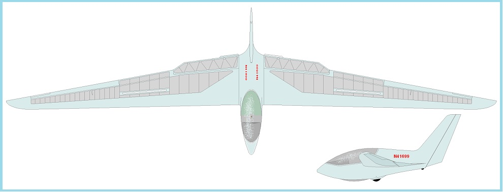 Mareske Pioneer 3